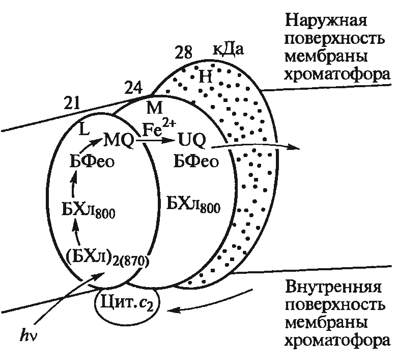 Фотосистема пурпурных бактреий